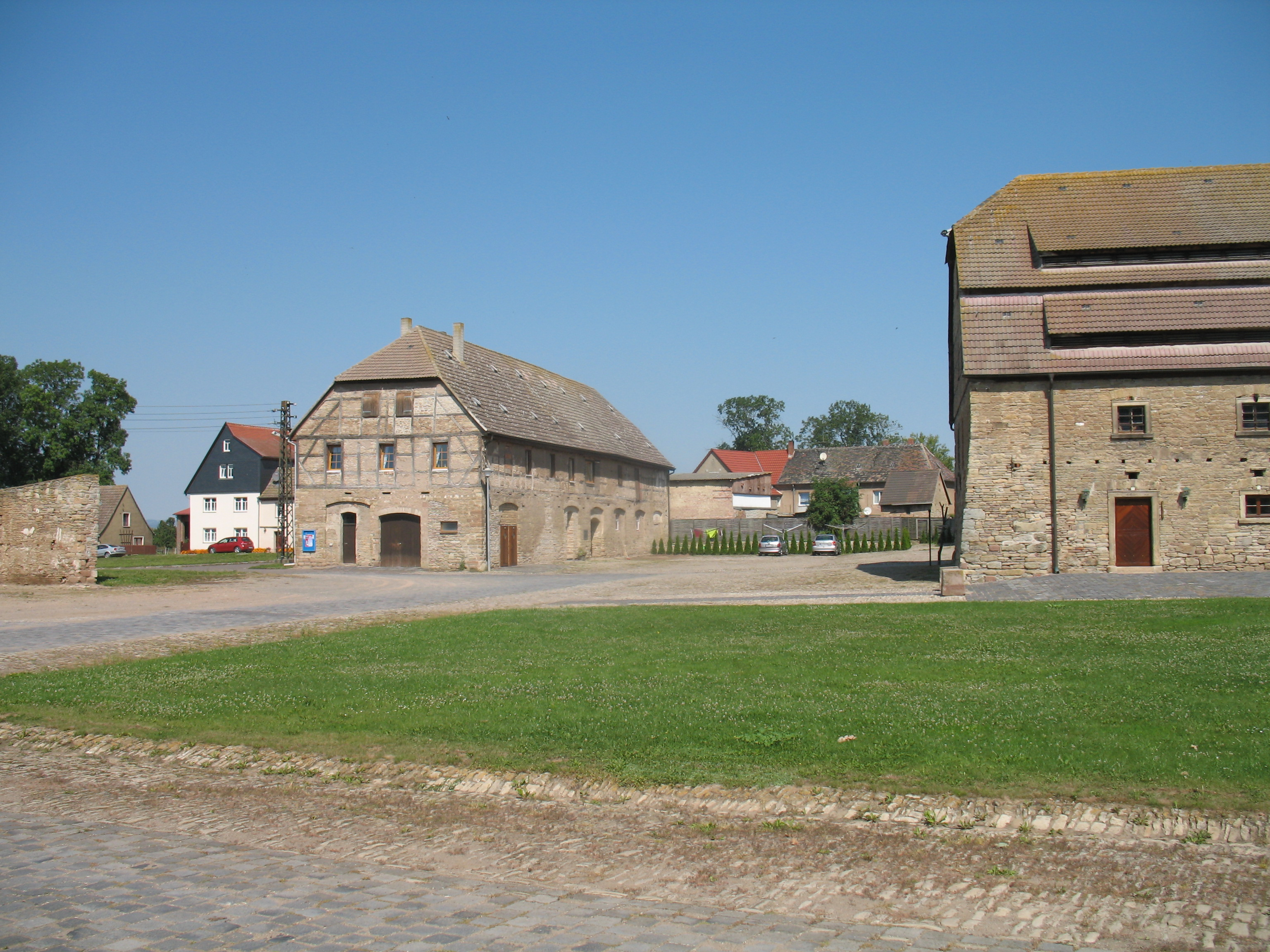 Wirtschaftsgebäude des Klosterguts in Mönchpfiffel, Thüringen